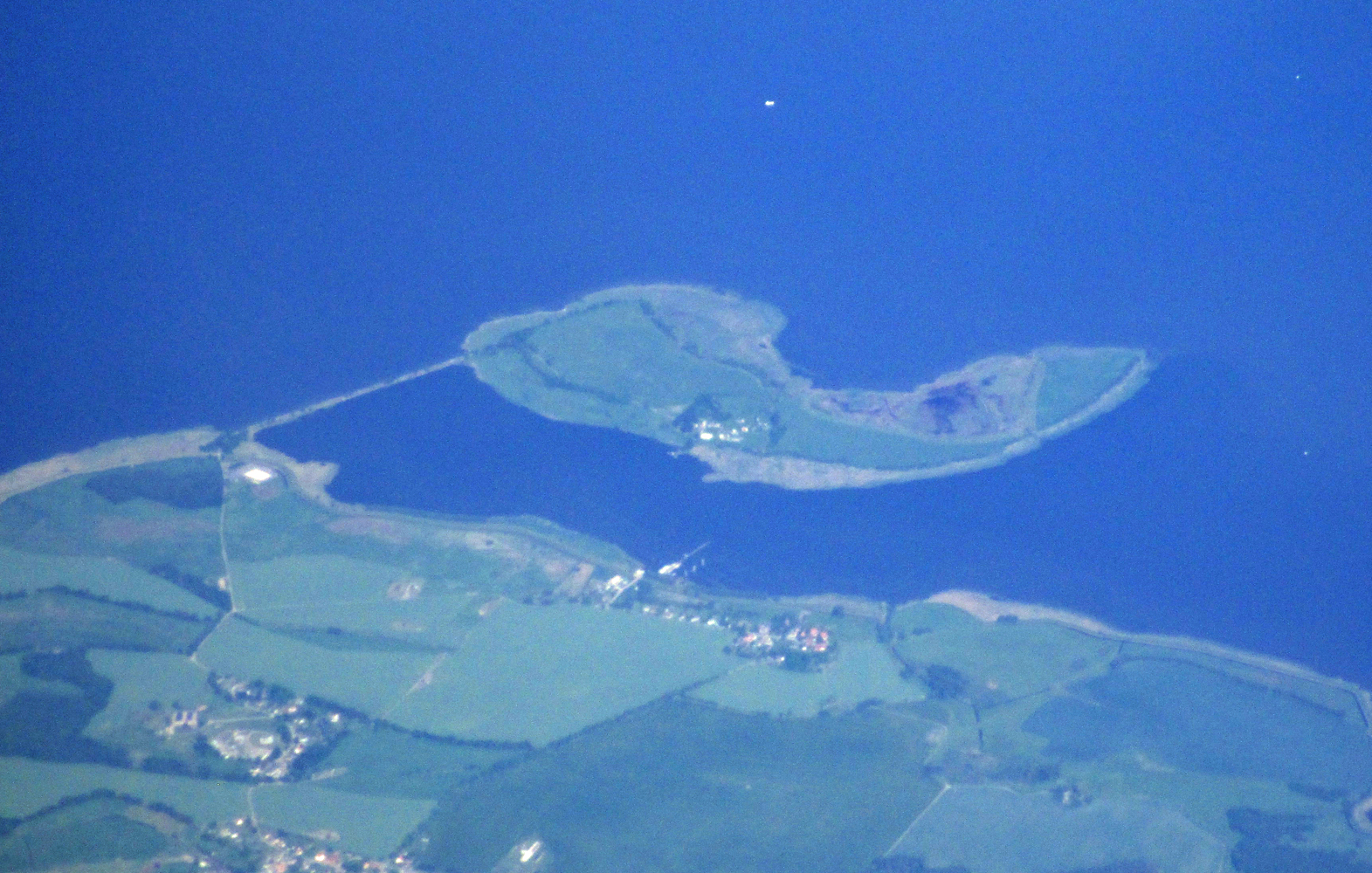 Insel Görmitz im Peenestrom, Luftaufnahme